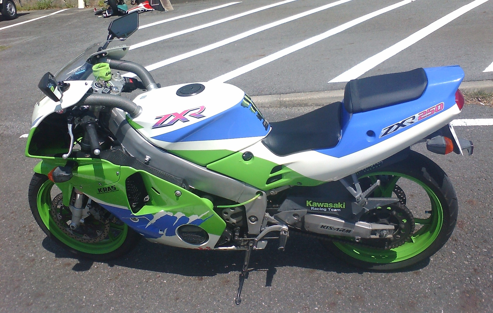 ZXR250(C3)